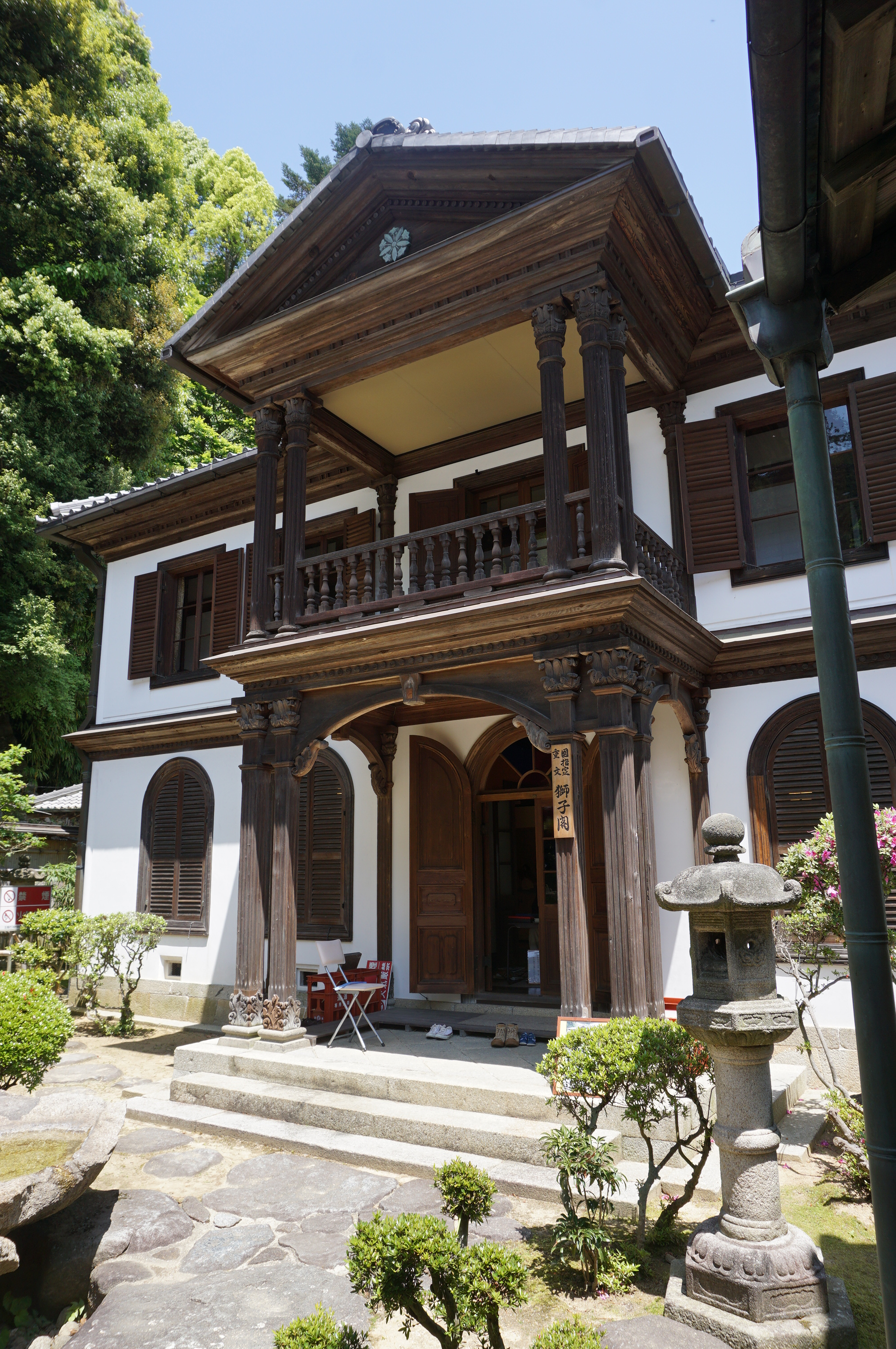 宝山寺獅子閣